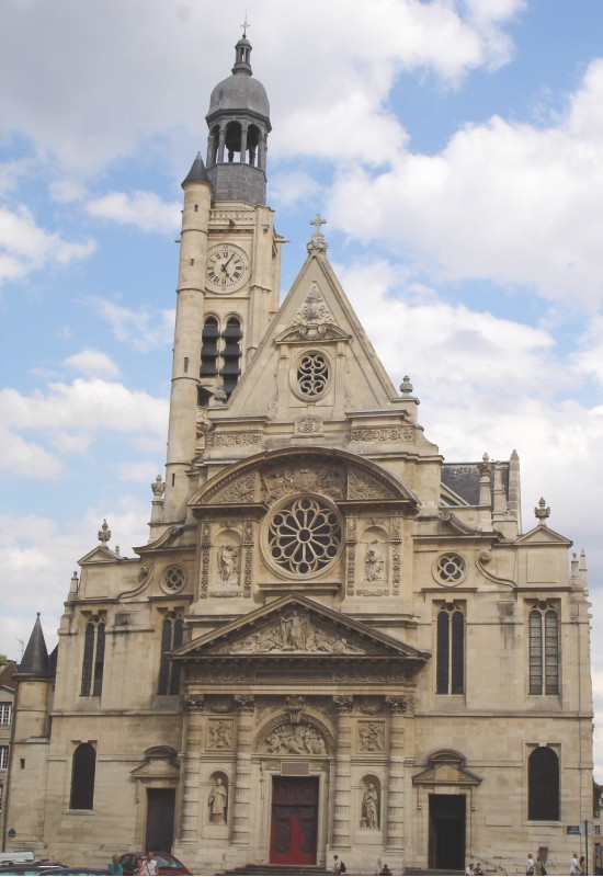 église Saint-Étienne-du-Mont, Ve arrondissement de Paris